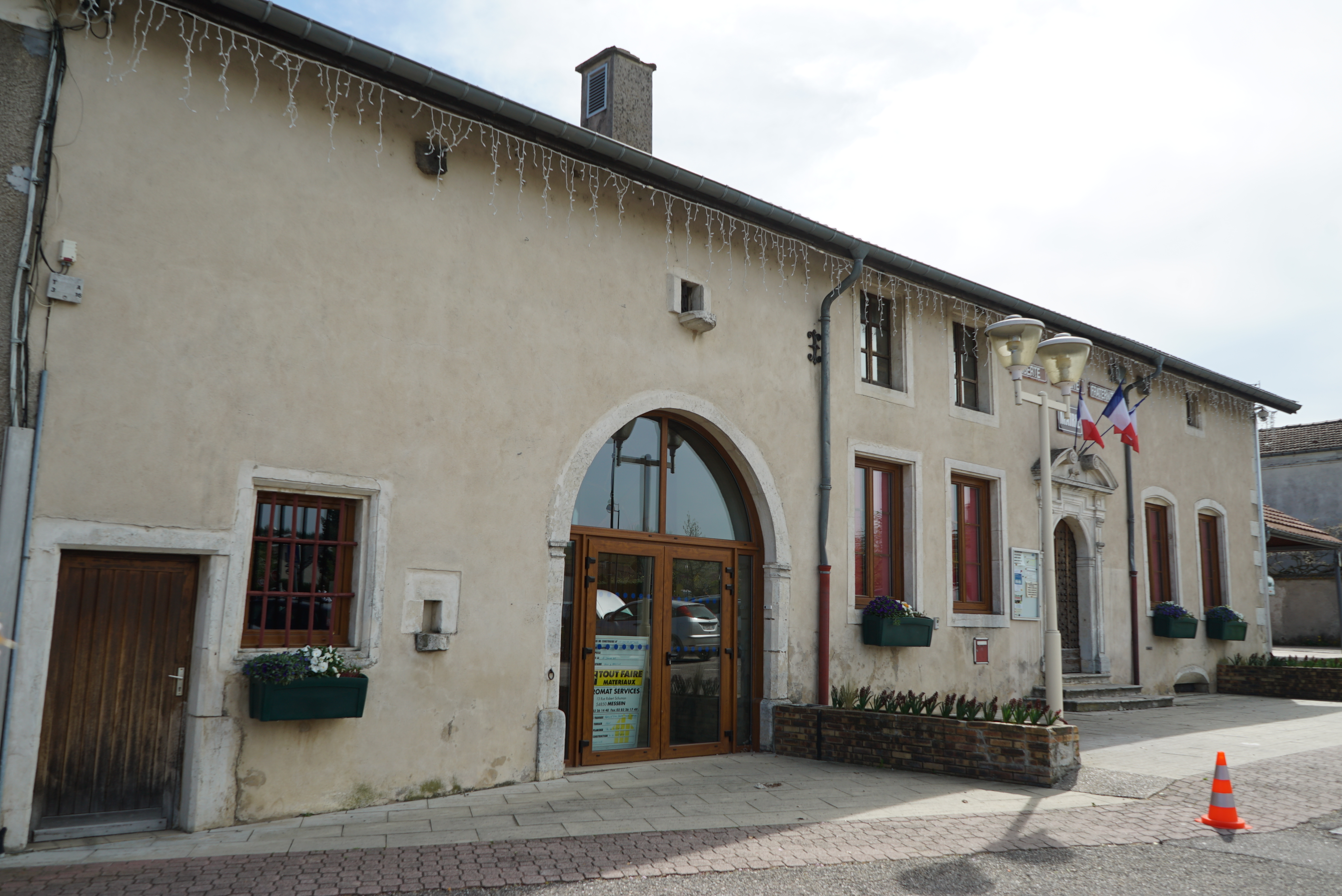 dans le village de Méréville.